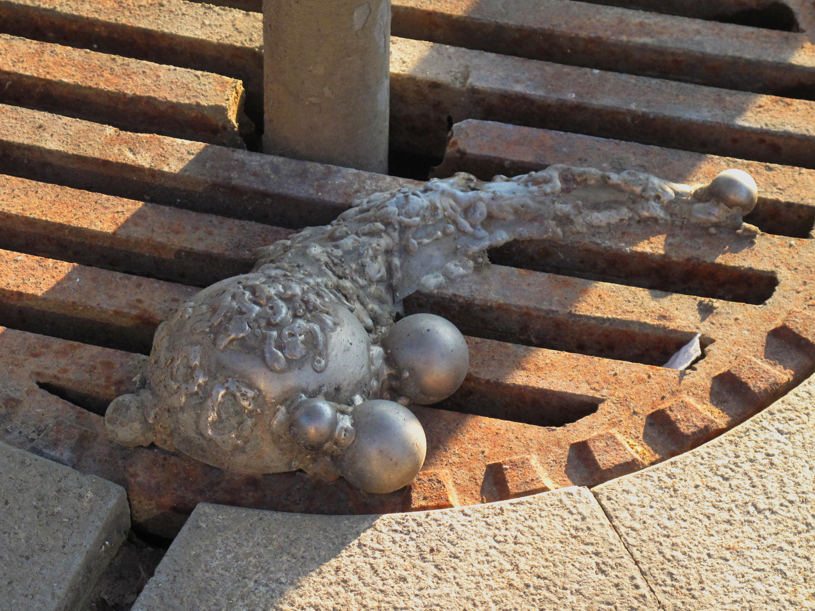 Lutz Ackermann, Brunnen (Detail am Boden), 1990, - Deutschland, Baden-Württemberg, Mötzingen, Rathaus